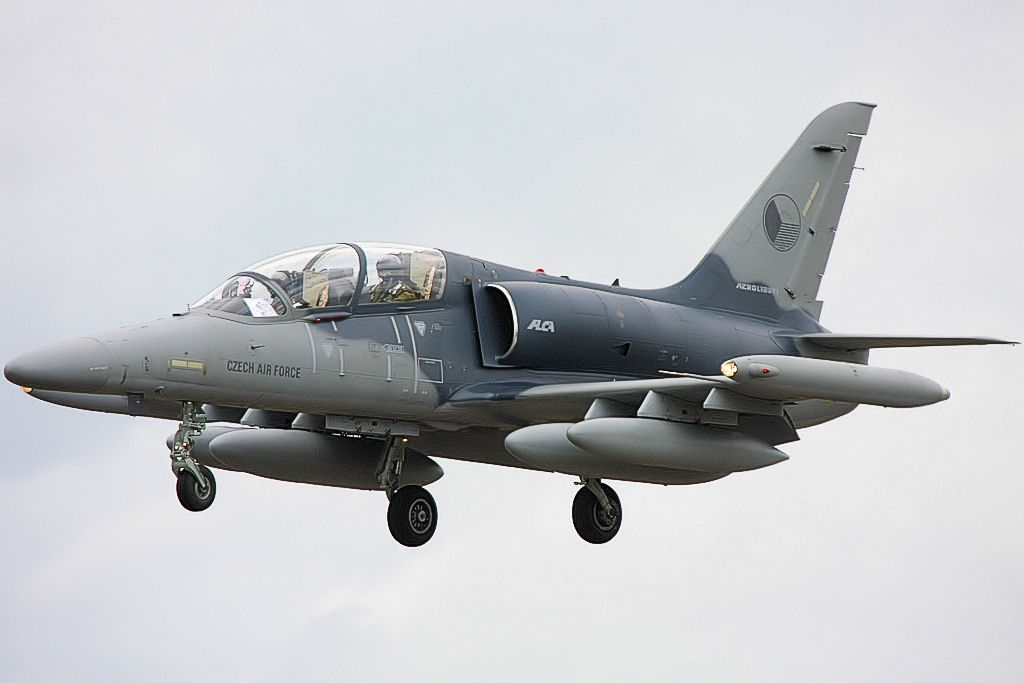 L159 - RIAT 2008